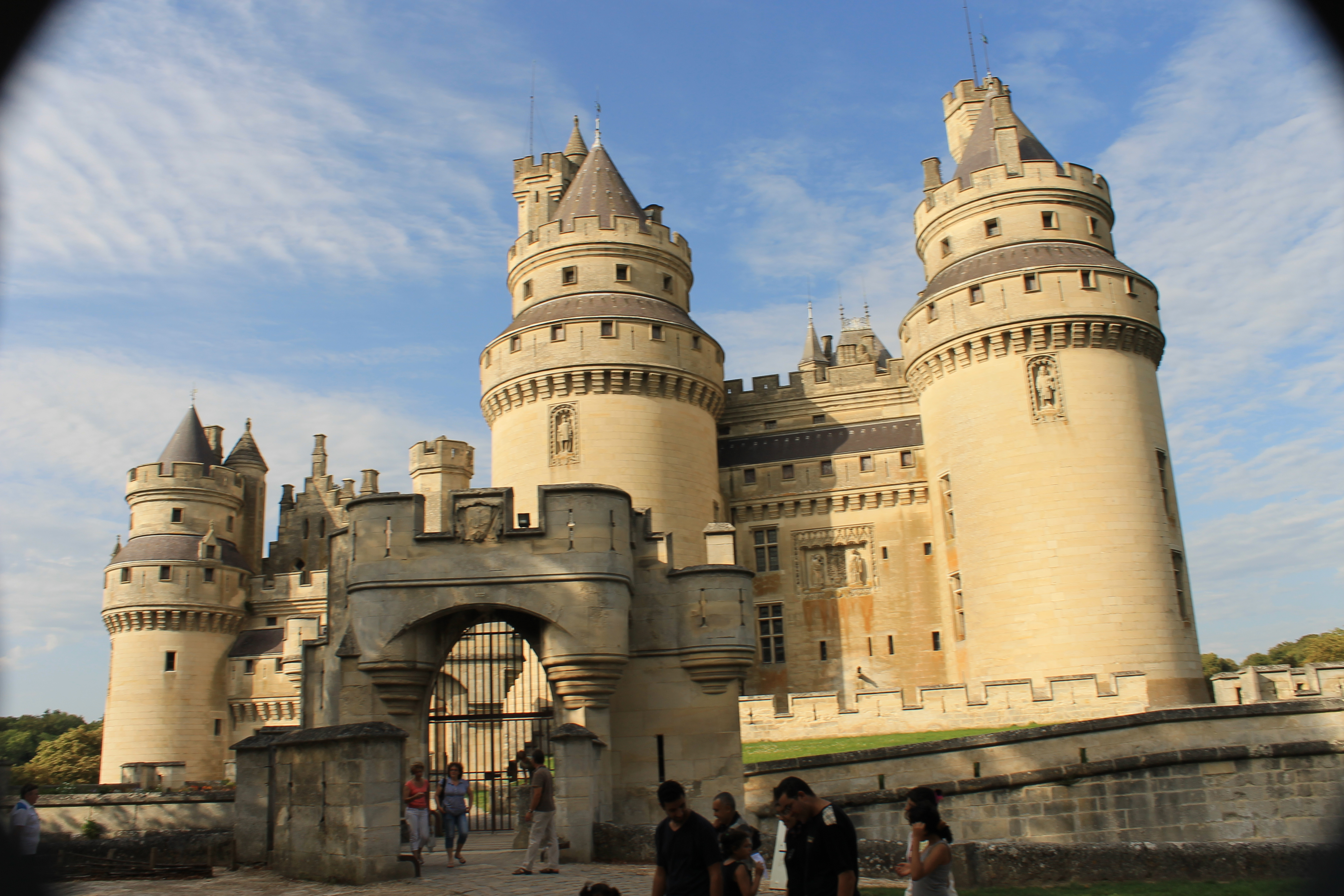 le chateau de pierrefond dans l'oise proche de compiegne